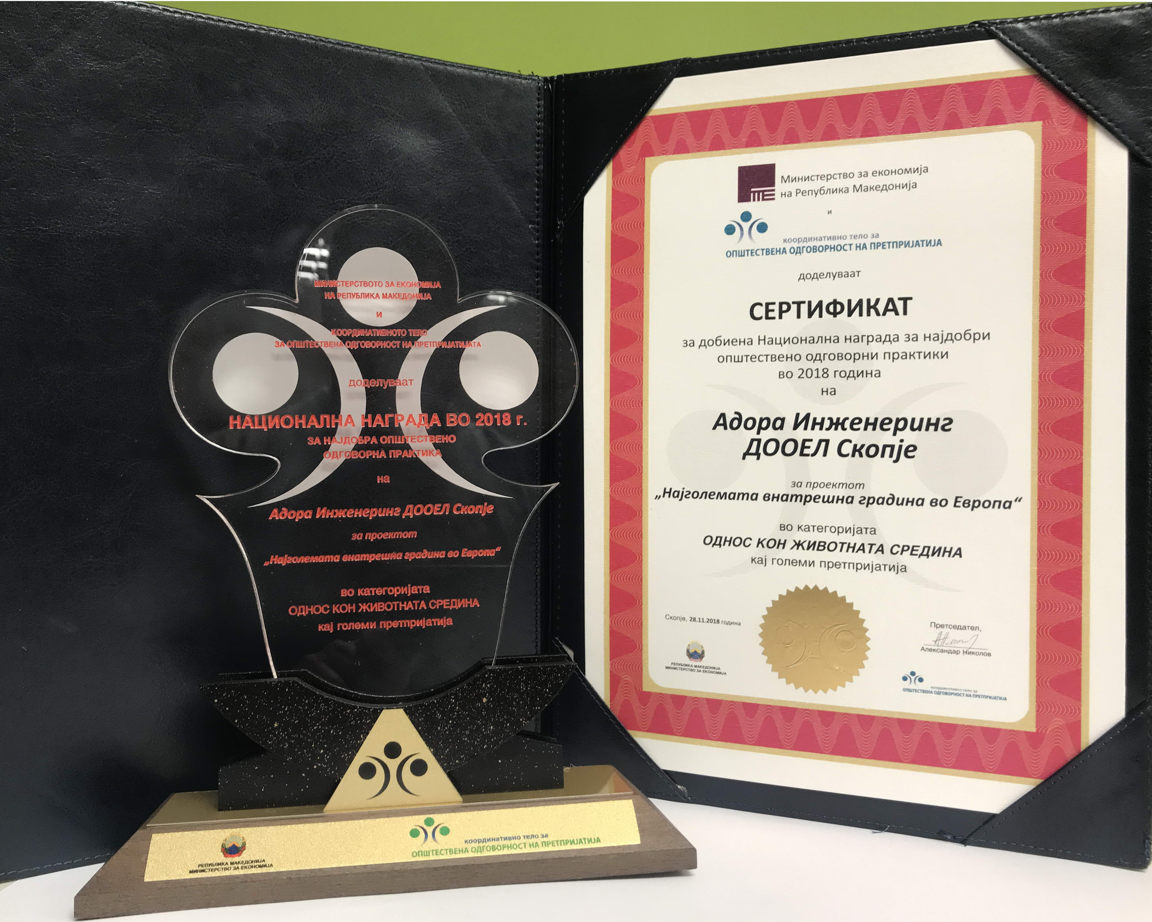 Adora nagradi OOP